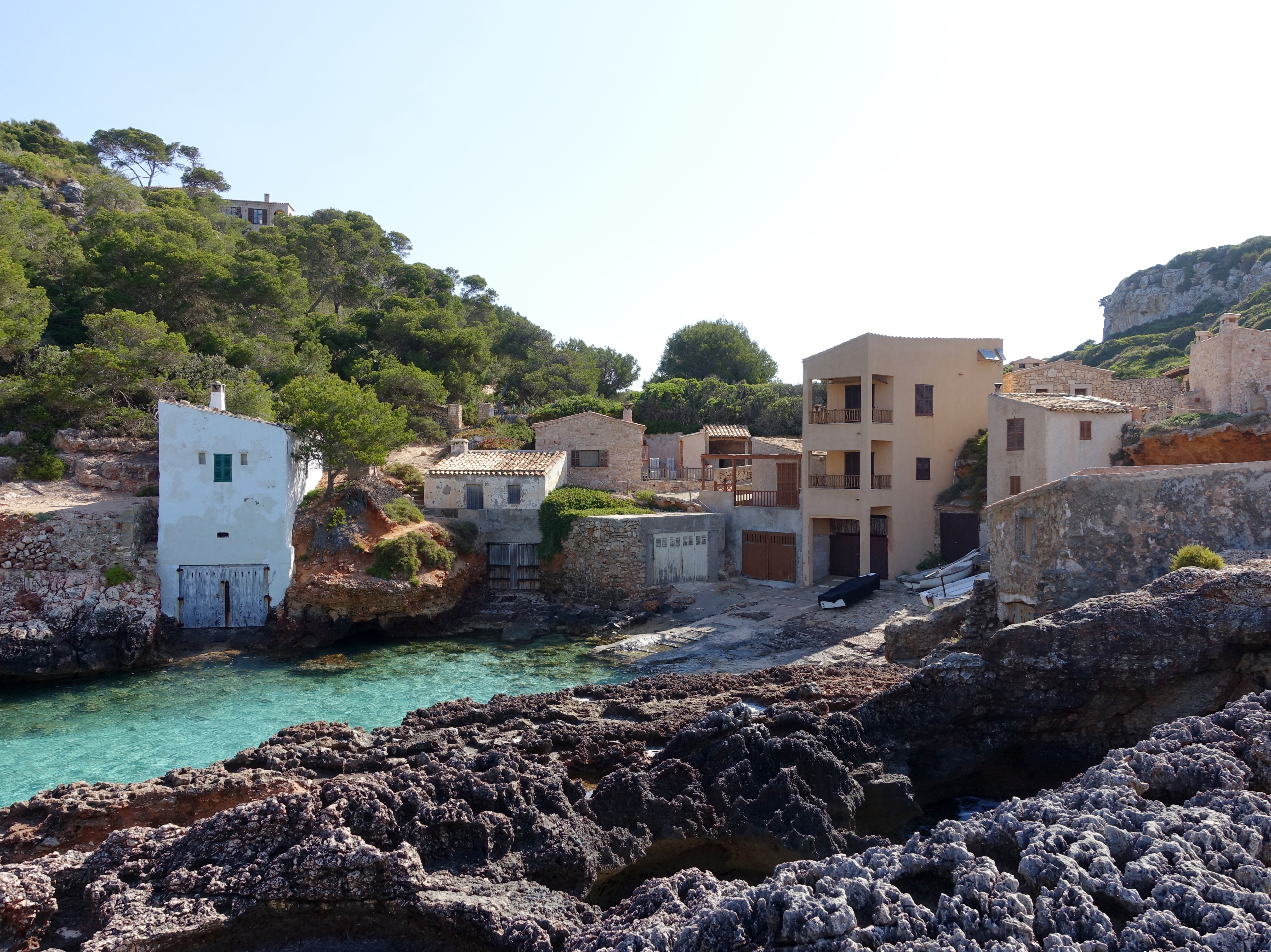 Cala s’Almunia, Gemeinde Santanyí, Mallorca, Spanien